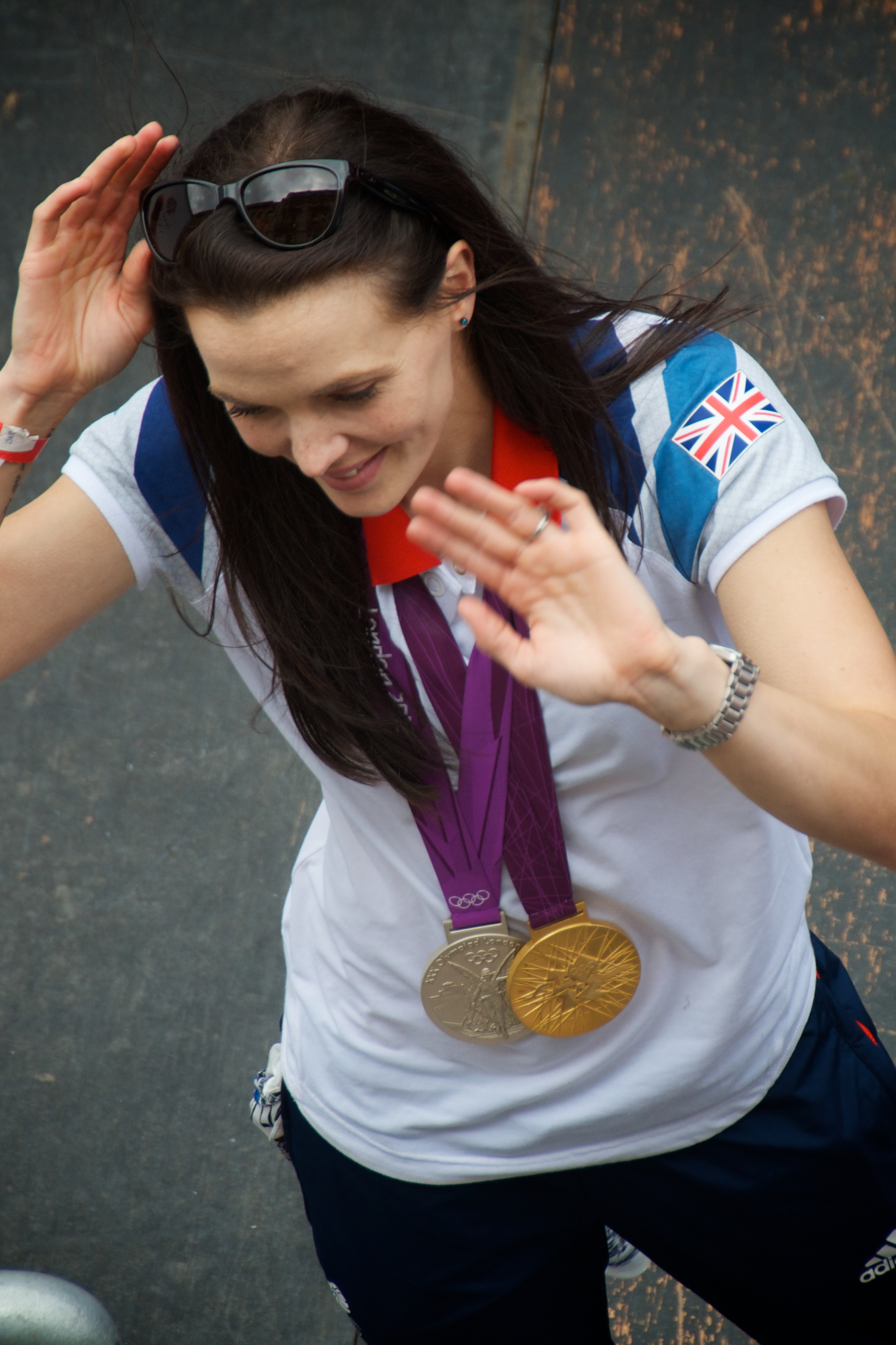 Cycling, keirin